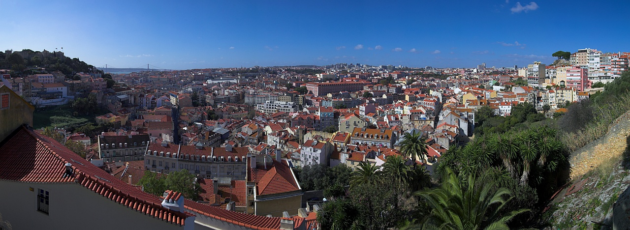 Vista panorâmica da varanda.